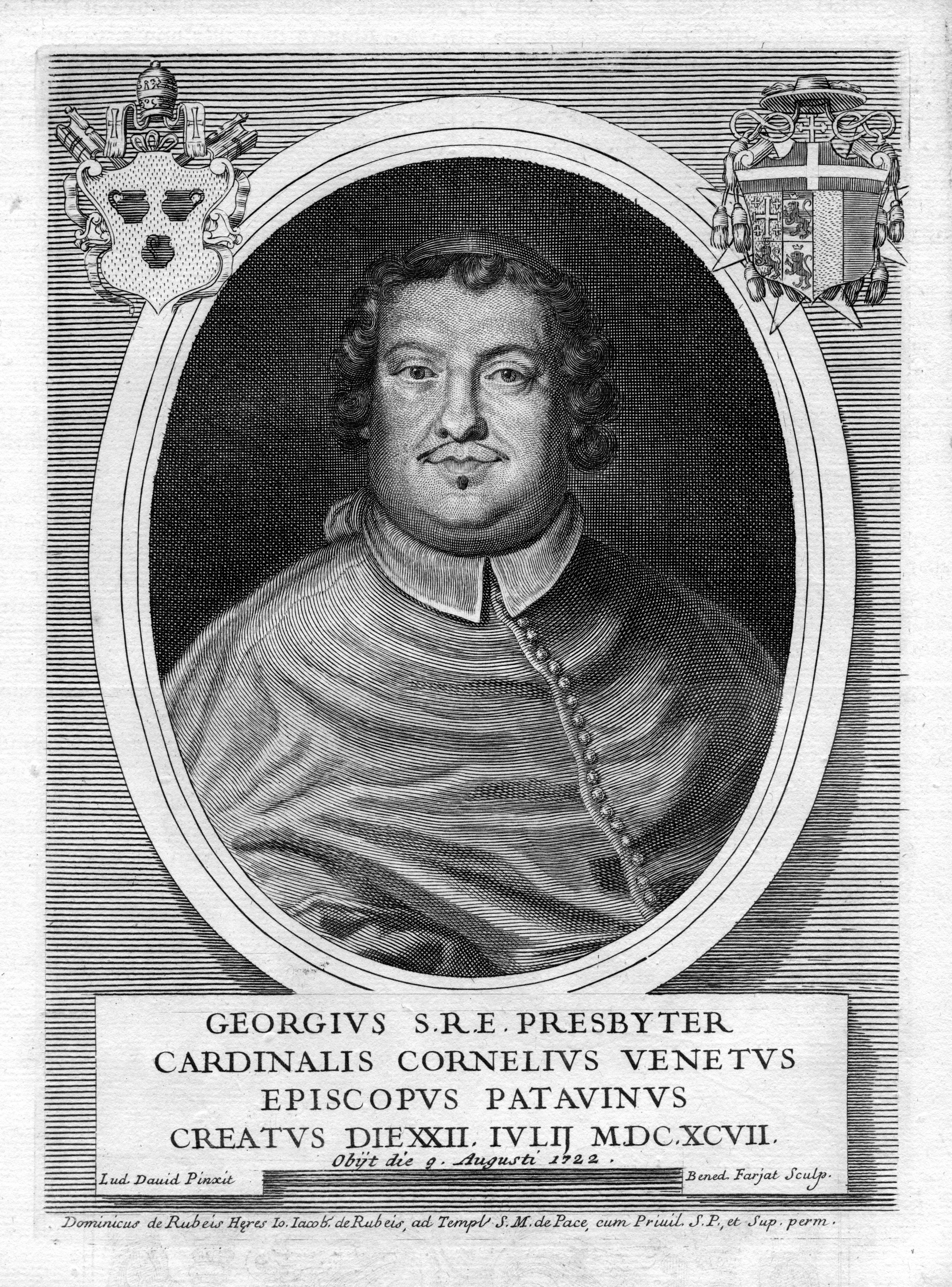 portrait gravé du cardinal Giorgio Corner